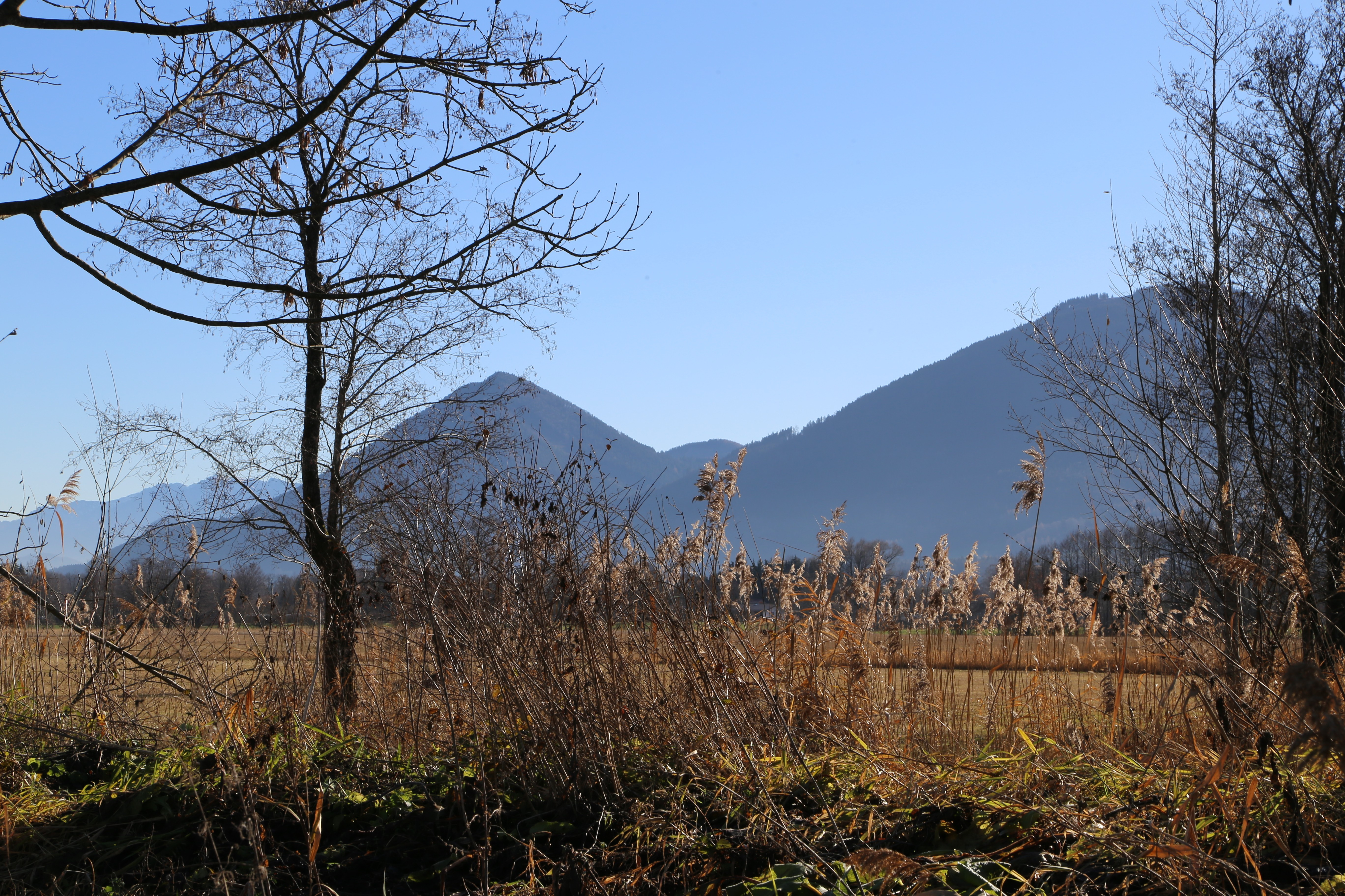 Auer Weidmoos, Bad Feilnbach Naturschutzgebiet NSG-00117.01